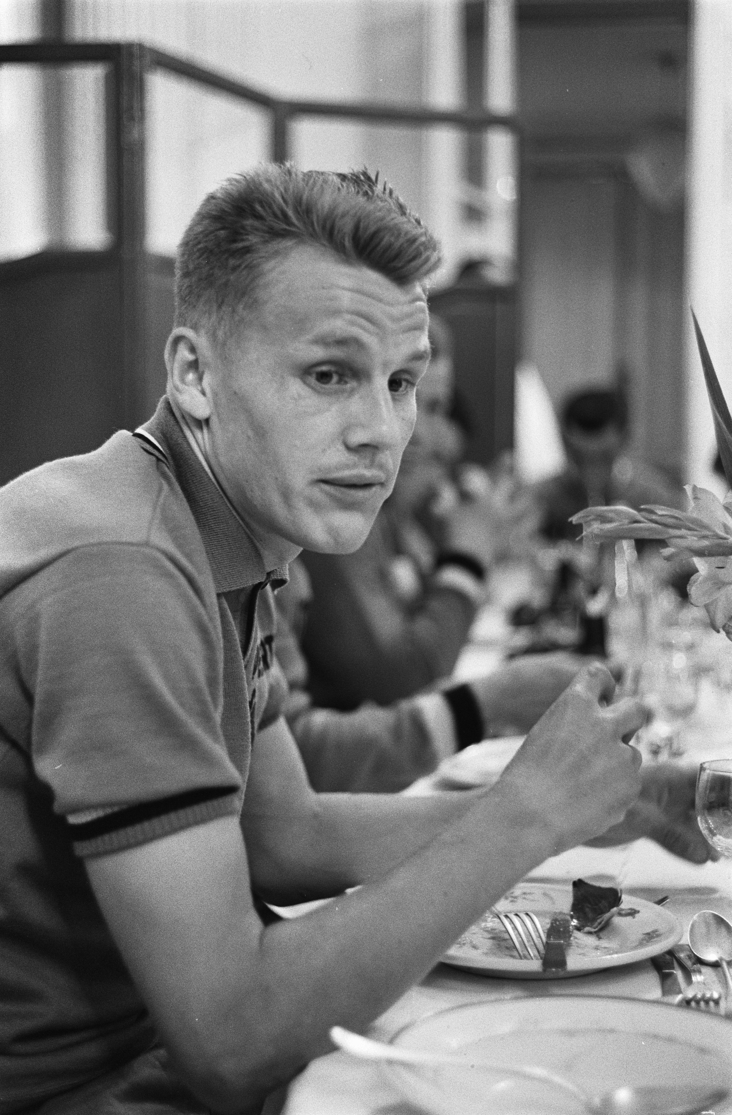 Collectie / Archief : Fotocollectie Anefo Reportage / Serie : Tour de France 1963 Beschrijving : Tour de France . Jan Janssen tijdens diner Datum : 27 juni 1963 Trefwoorden : diners, sport, wielrennen, wielrenners Persoonsnaam : Janssen, Jan Instellingsnaam : Tour de France Fotograaf : Fotograaf Onbekend / Anefo Auteursrechthebbende : Nationaal Archief Materiaalsoort : Negatief (zwart/wit) Nummer archiefinventaris : bekijk toegang 2.24.01.05 Bestanddeelnummer : 915-3105